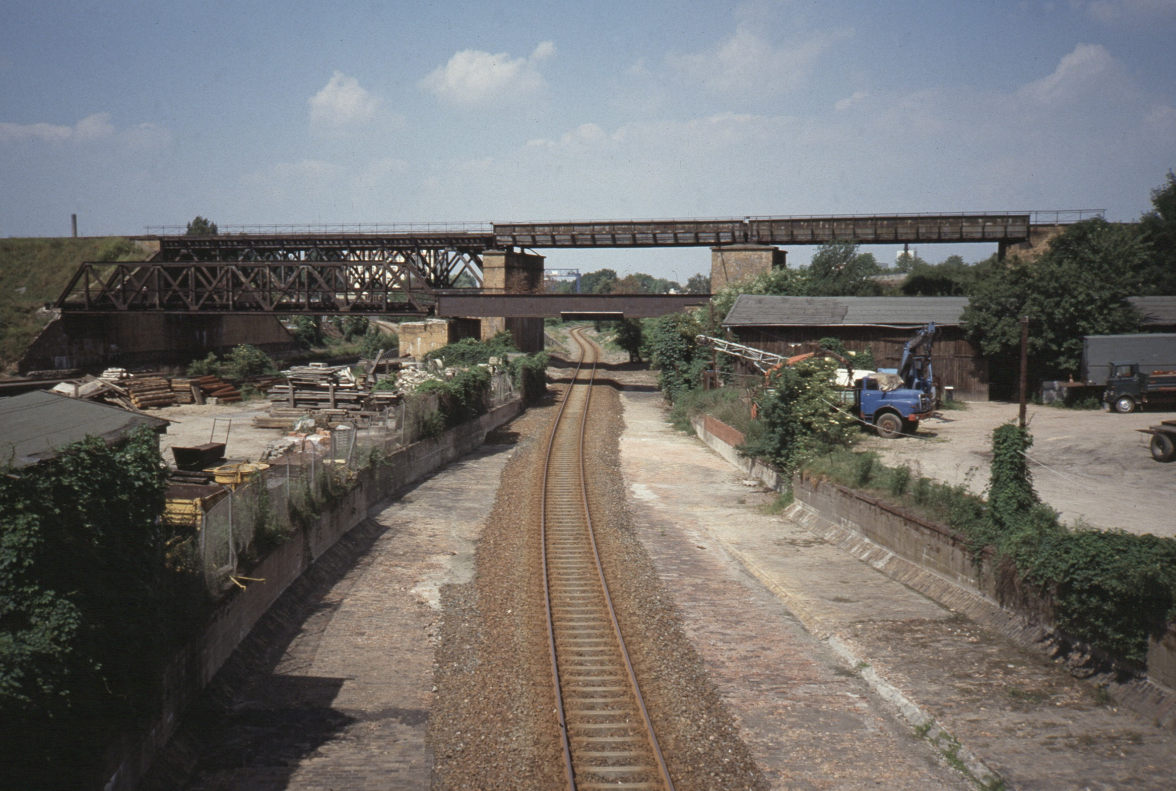 Bahnbrücken Neuköllner Schifffahrtskanal Berlin